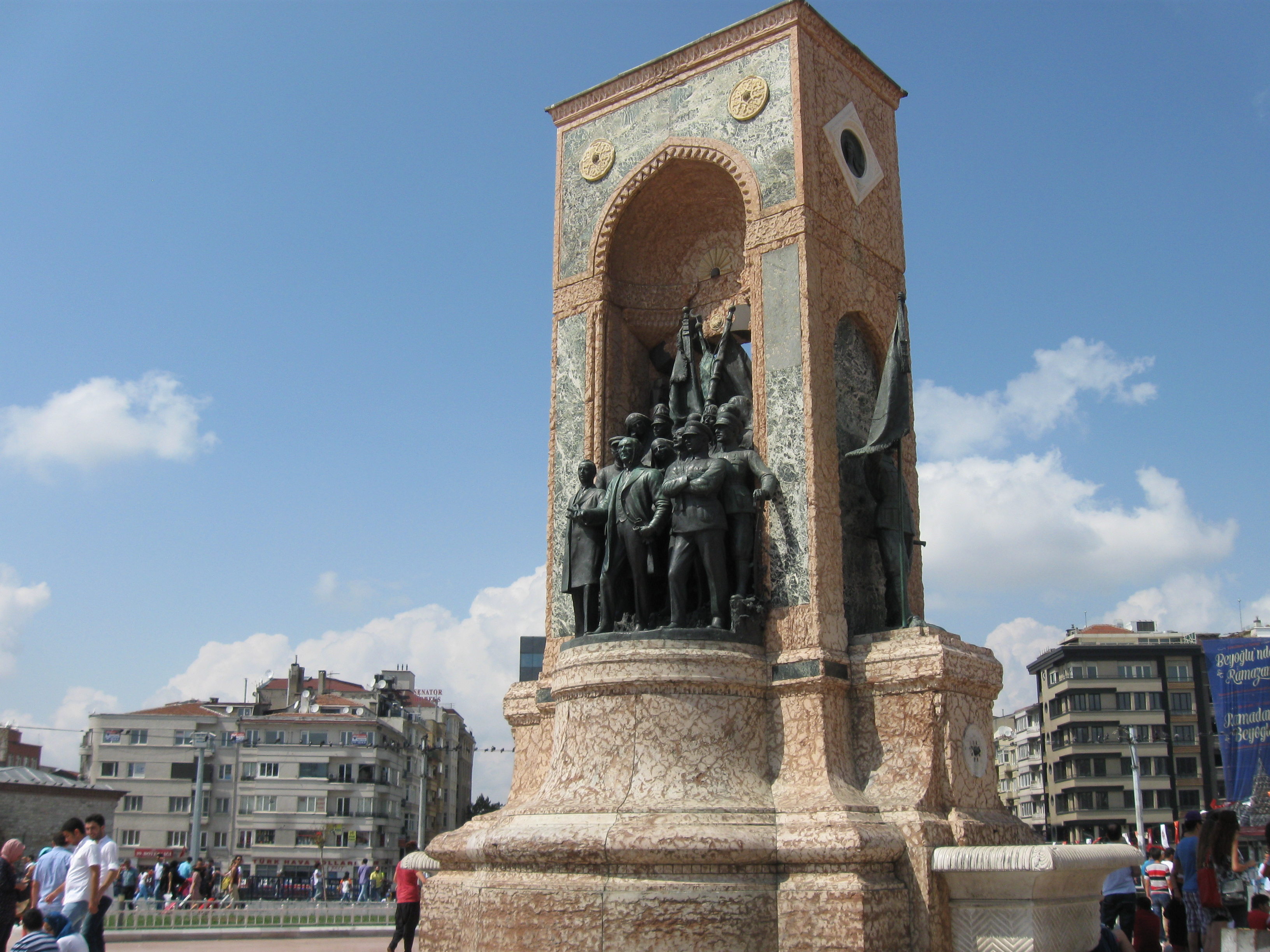 Թաքսիմ հրապարակ